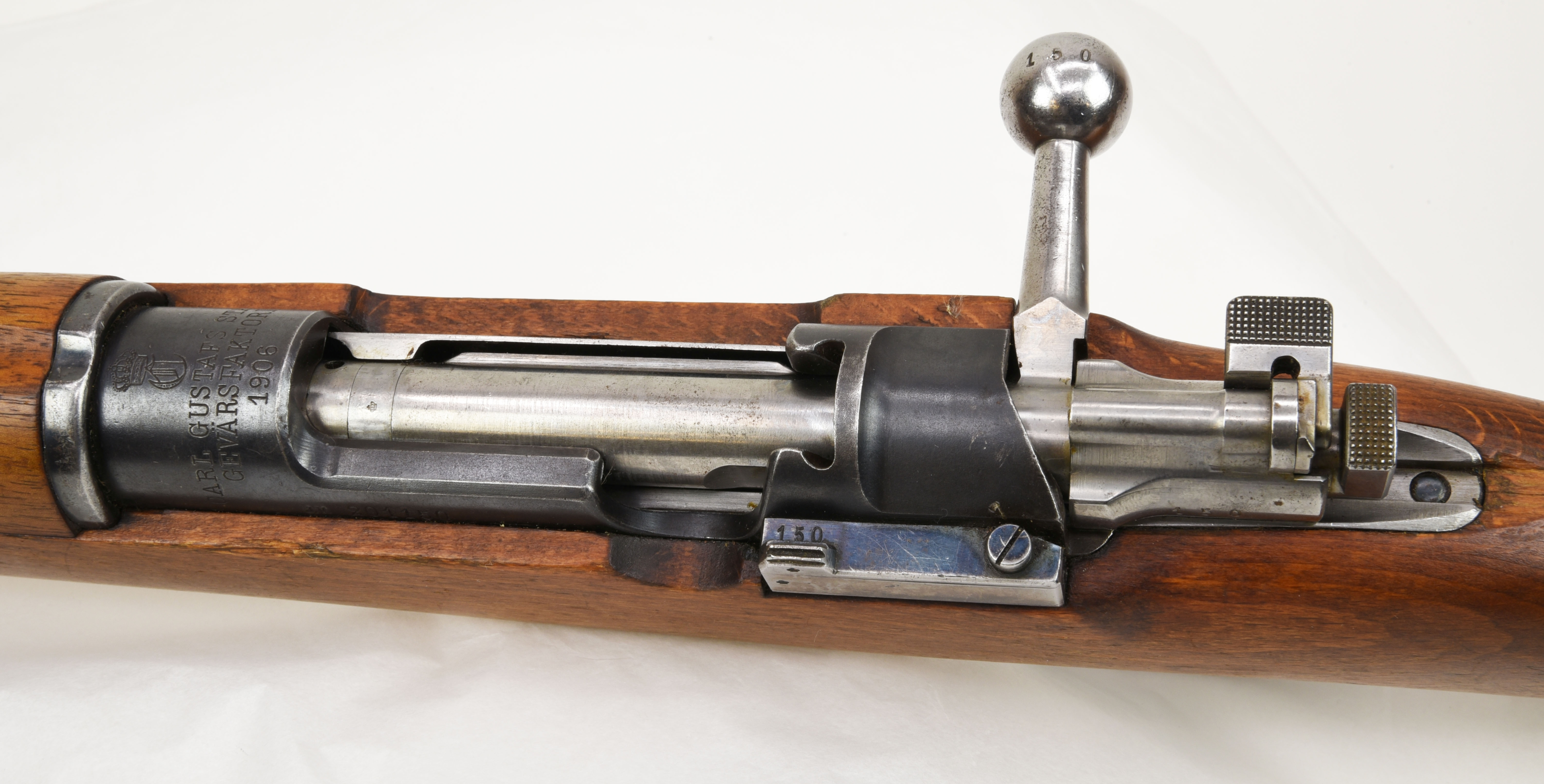 Detta exemplar är tillverkat av Carl Gustaf stads Gevärsfaktori år 1906, och har använts inom SJ Driftvärn. Modellen Gevär m/96 utvecklades av tyska Waffenfabrik Mauser AG på beställning av den svenska armén. Drygt 535.000 gevär kom att tillverkas av Mauser, Carl Gustafs Gevärsfaktori samt Husqvarna Vapenfabriks AB mellan 1896 och 1944. Den sista grenen inom svenska armén att pensionera geväret var Hemvärnet som 1995 ersatte den med Automatkarbin 4 / Ak 4. Det här exemplaret har använts inom SJ Driftvärn. Efter att SJ Driftvärn avvecklades 2005 kom en del föremål från driftvärnet att leva vidare vid en av driftvärnets f.d. kursgårdar i Dala-Storsund där föremål bland annat förvarades i ett traditionsrum som fungerade som ett museum eller en utställning över Driftvärnets utveckling, samt i ett gammalt materialförråd. Kursgården var ursprungligen en av 12 kursgårdar runt om i Sverige som ägdes av Statens Järnvägar. Kursgårdarna hade använts som läroplattformar för driftvärnspersonalen och där fick de bland annat lära sig skytte och militär stridsteknik. När Statens Järnvägar bolagiserades överfördes kursgårdarna till Banverket som senare omvandlades till Trafikverket. Kring 2013 beslutade sig Trafikverket för att kursgården i Dala-Storsund skulle moderniseras och i samband med det så revs bl.a. det så kallade traditionsrummet. I oktober 2014 samlade Järnvägsmuseet in diverse olika föremål från det före detta traditionsrummet samt materialförrådet vid kursgården för att komplettera sin samling av föremål och berättelser från driftvärnet.